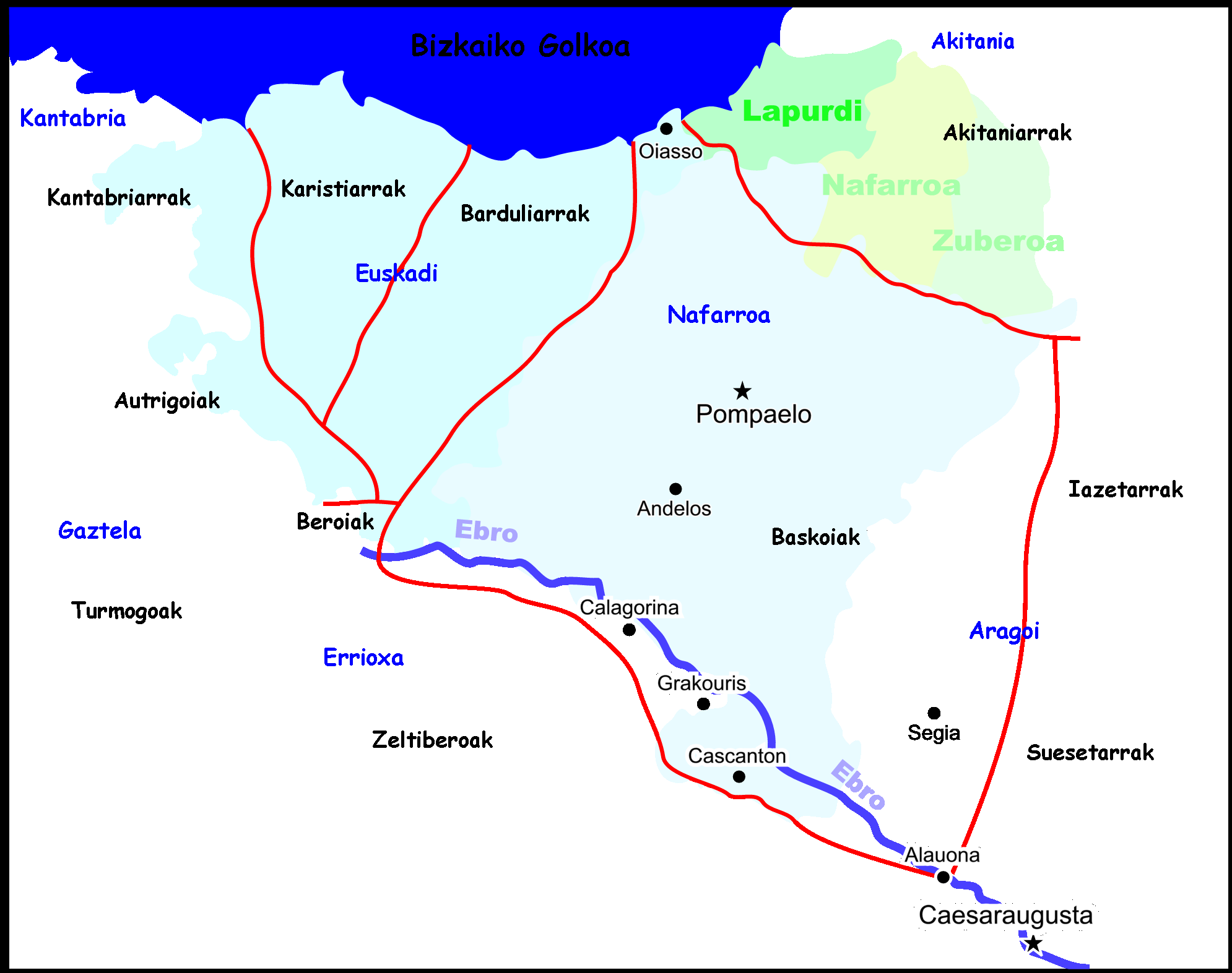 Baskoien lurraldea